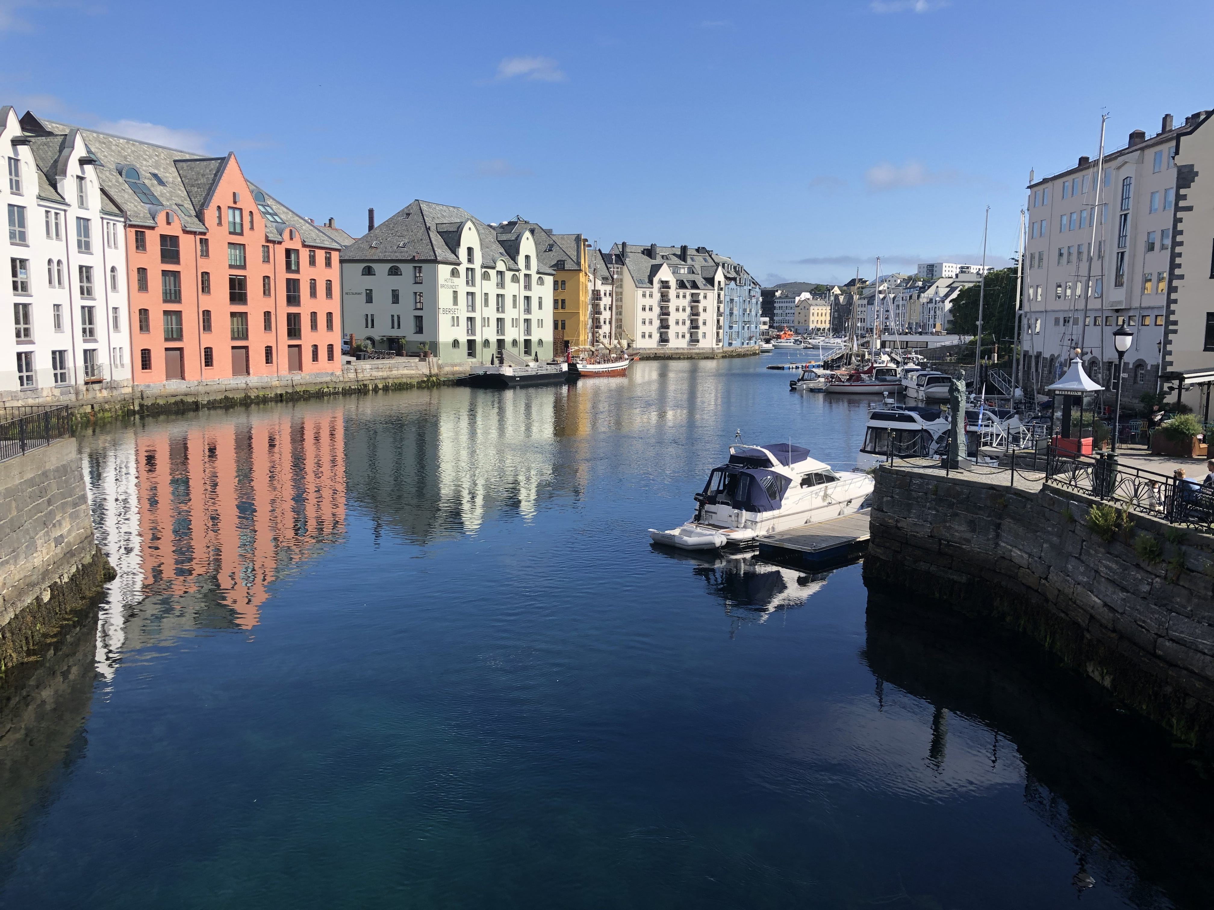 Ålesundet